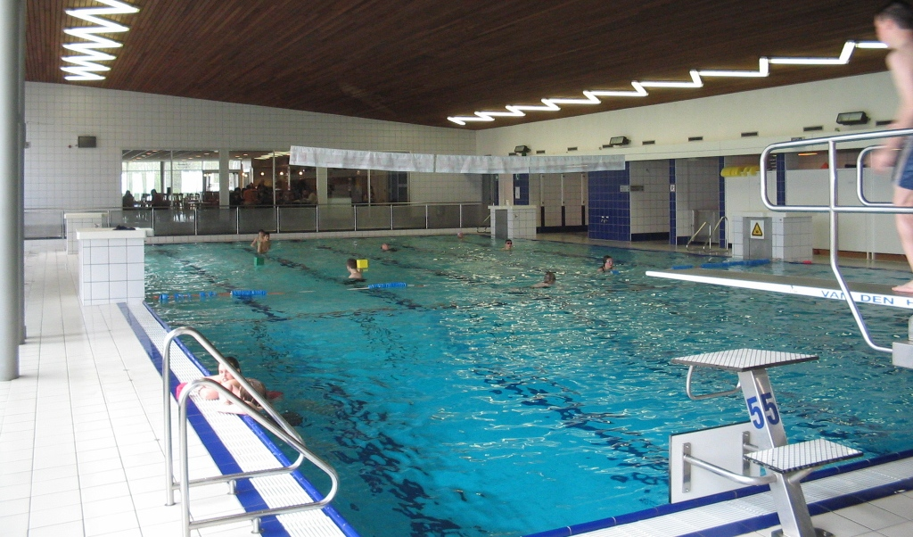 Deburghgraeve bad